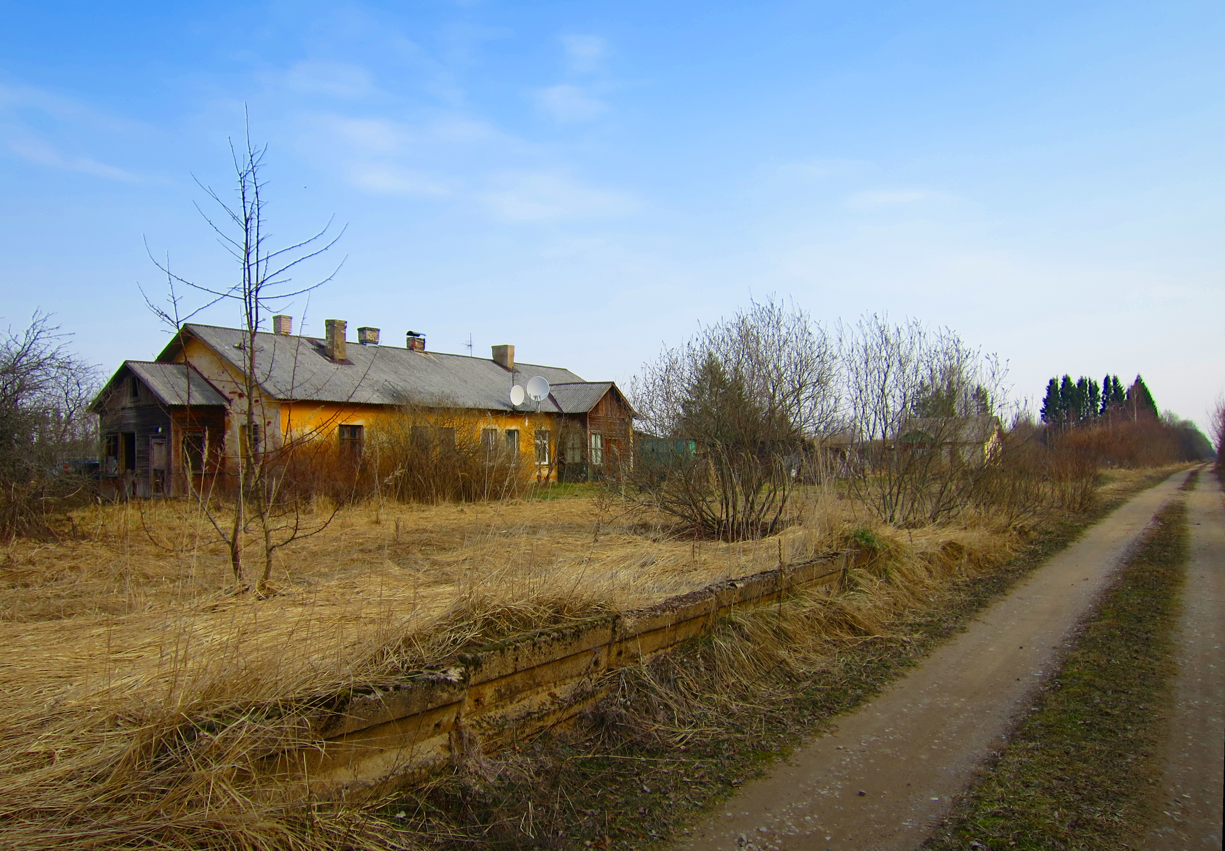 Perona mala un ēka "Ziediņi 2"